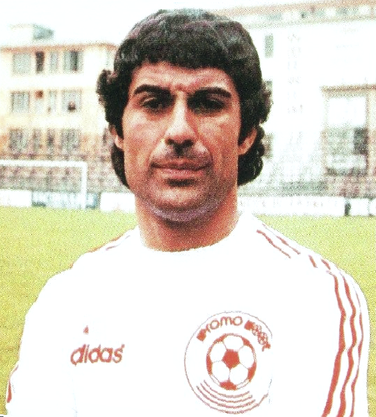 Delio Onnis en 1978 (AS Monaco), 'Football 79' (americana), Panini figurina n°61.